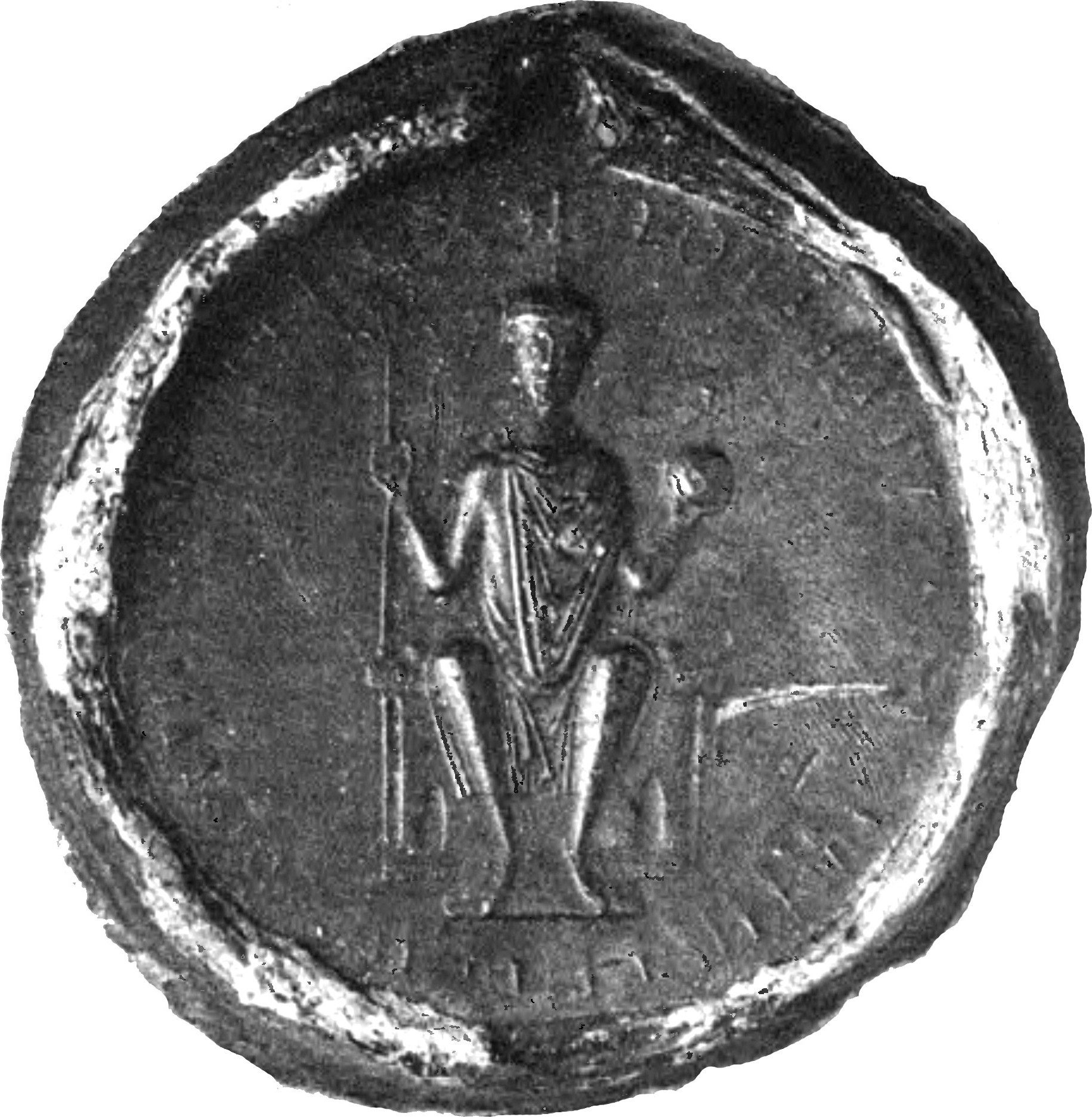 Siegel Kaiser Lothar III. (HRR) auf einer Urkunde aus dem Jahr 1131, Bestätigung eines Schiffahrtsrechtes an die Abtei von Echternach